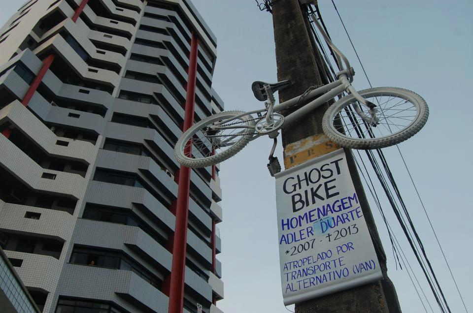 Bicicleta Fantasma em homenagem a Adrian Menezes Duarte, 5, assassinado por transporte alternativo quando se dirigia à escola no varão de uma bicicleta conduzida por um adulto na Av. Santos Dumont em Fortaleza.